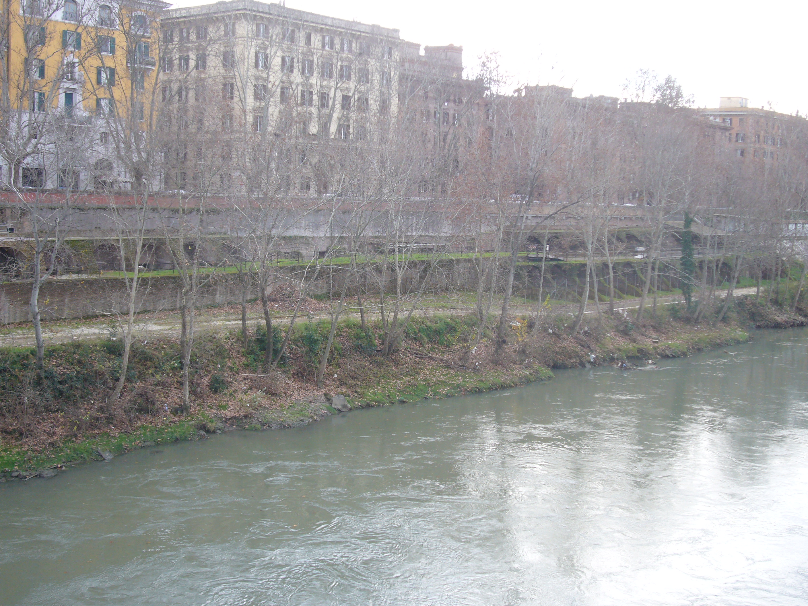 Roma, lungotevere Testaccio e scavi dell'emporio romano